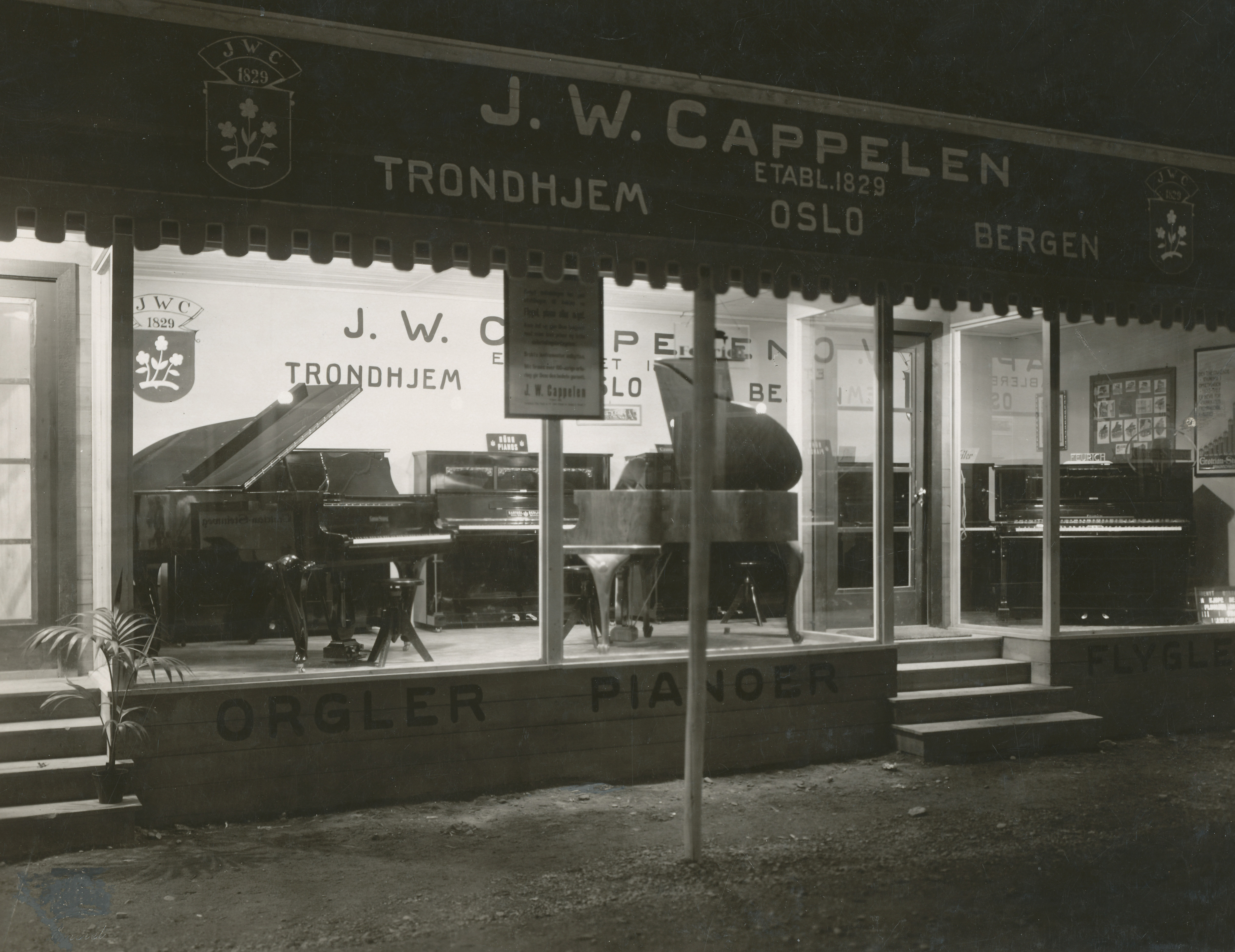 Trøndelagsutstillingen 1930. Cappelens forlag har ikke drevet bare med bøker. J. W. Cappelen; orgler, pianoer og flygler. Ukjent fotograf.